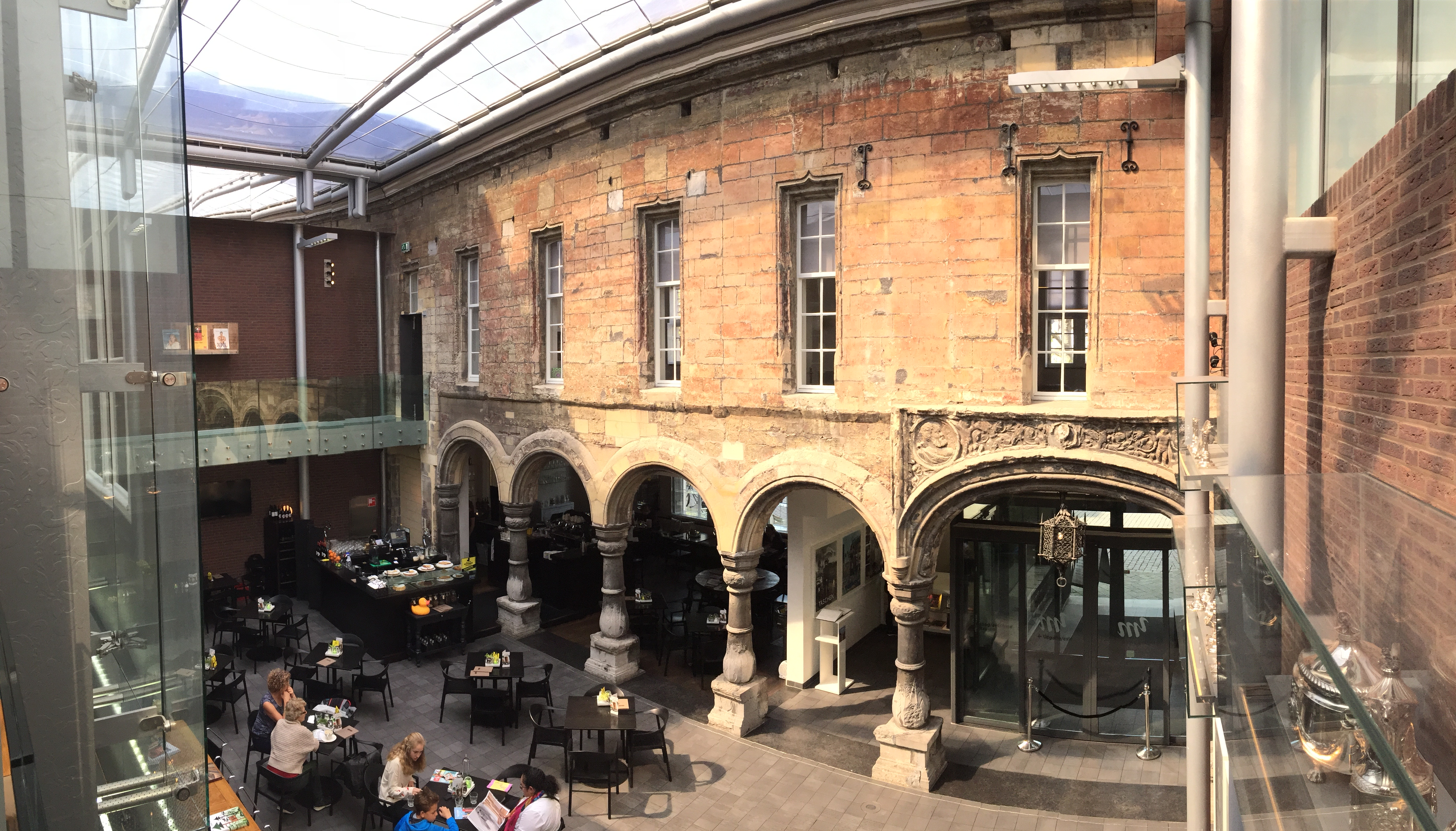 De zuilenarcade met rechts de ingang naar Museum en Grand Café